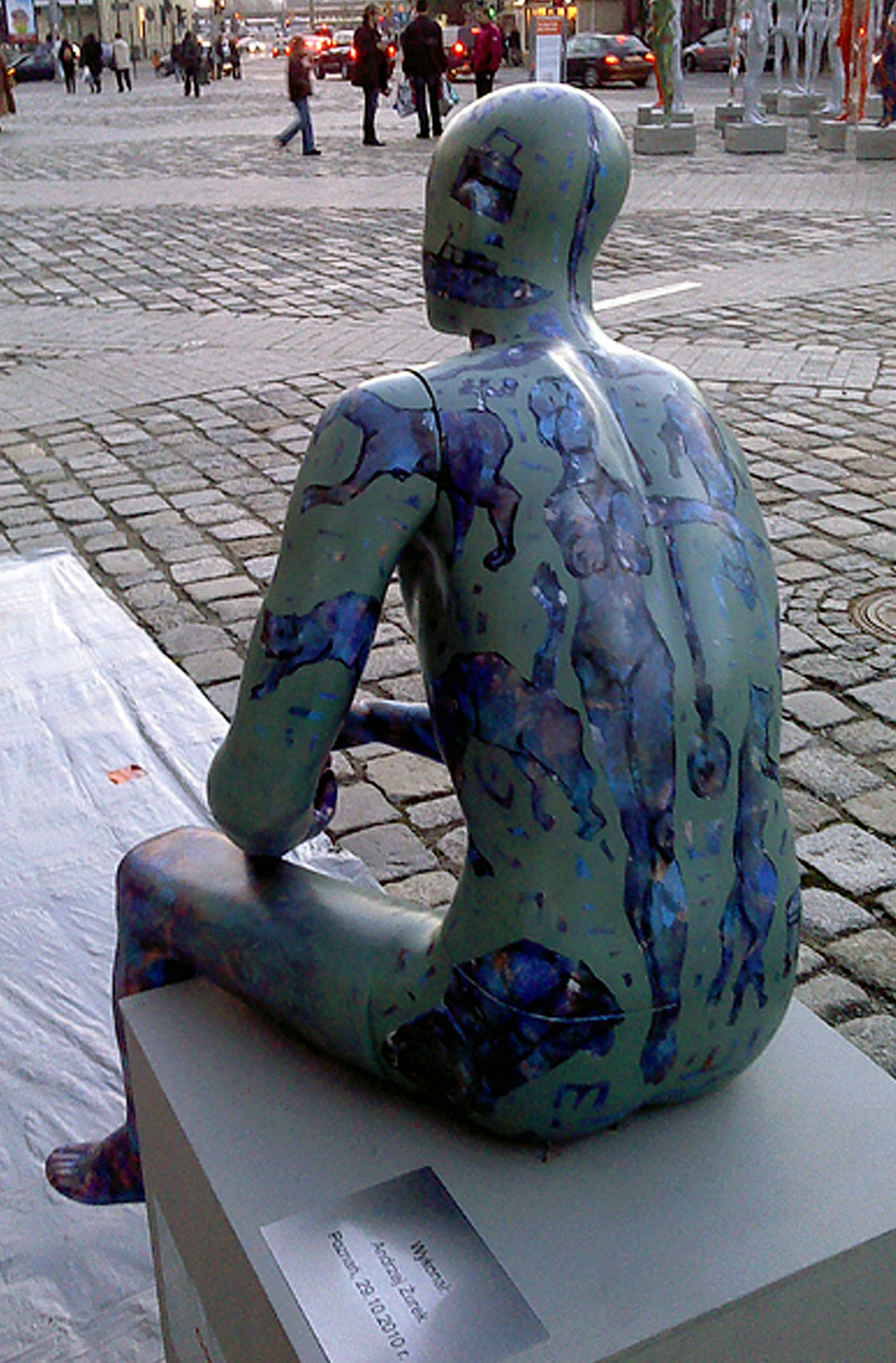 Rzeźba manekin malowana przed Starym Browarem w Poznaniu w 2010.